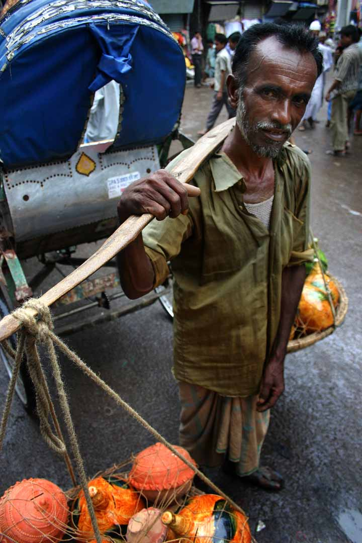 Bangladeshi street vendor. He's selling clay piggybanks.